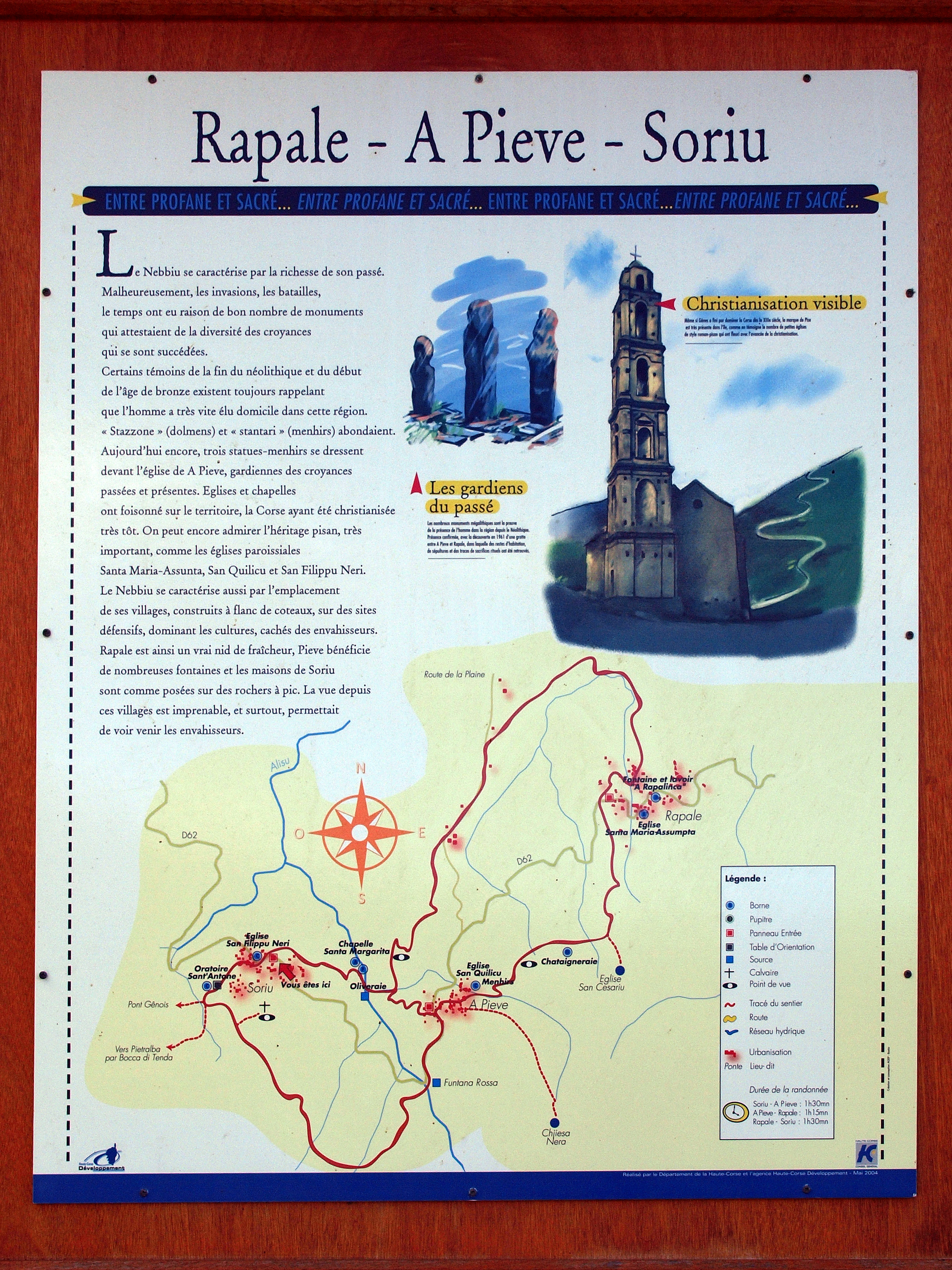 Sorio, Nebbio (Corse) - Panneau du sentier patrimonial Rapale - Pieve - Sorio